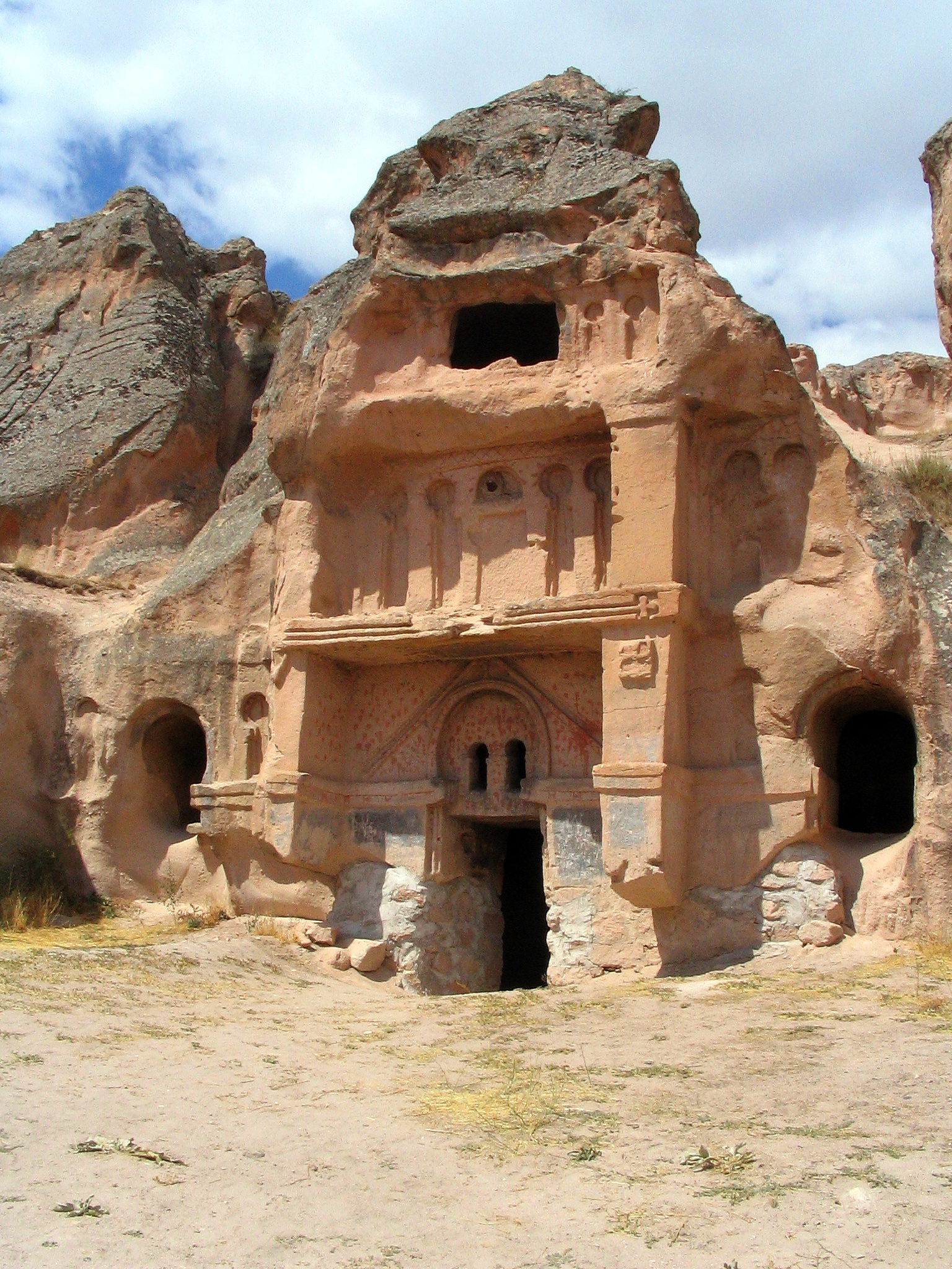 Fassade einer Felskirche in Aciksaray bei Gülsehir, Kappadokien, Zentraltürkei